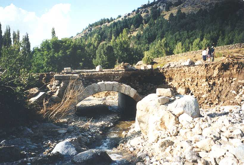 El puente del río de la Gargantilla tras la riada del 1 de septiembre de 1999. Autor: C3PO